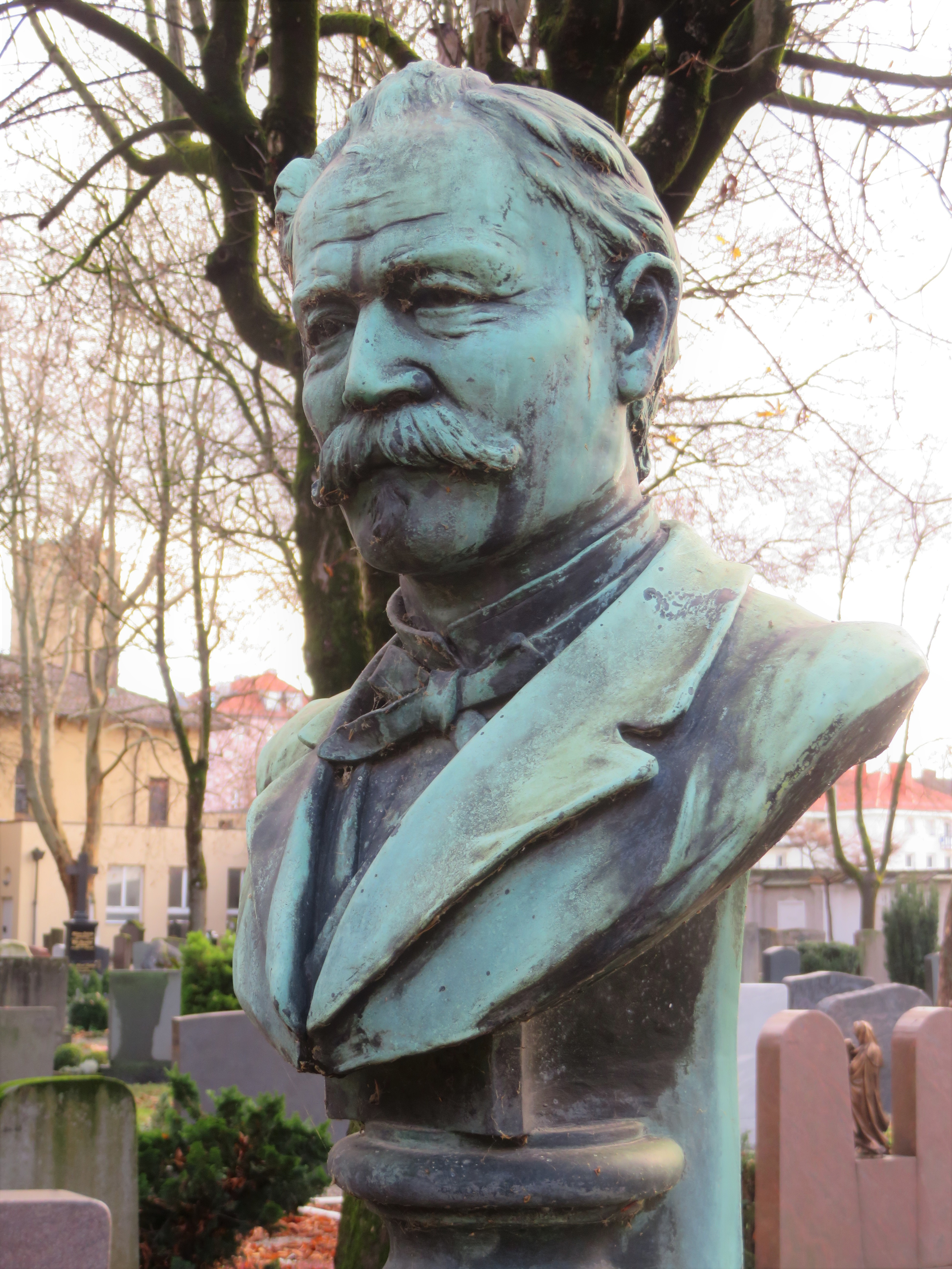 Bronzebüste auf dem Grabstein des Architekten und Stadtbaurats Ludwig Leybold (1833-1891) auf dem Katholischen Friedhof an der Hermanstraße in Augsburg. (Lage: Feld 8, am Weg, Nr. 56, 57)